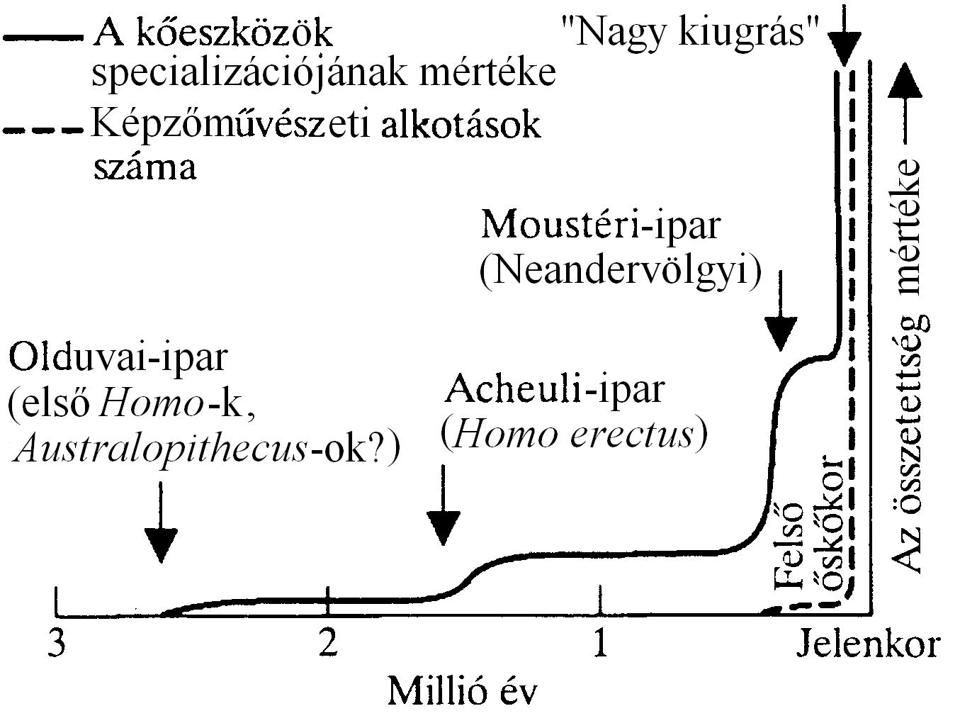 Ez a kép az emberősök specializált kőeszközeinek és művészeti alkotásainak számát mutatja az idő függvényében